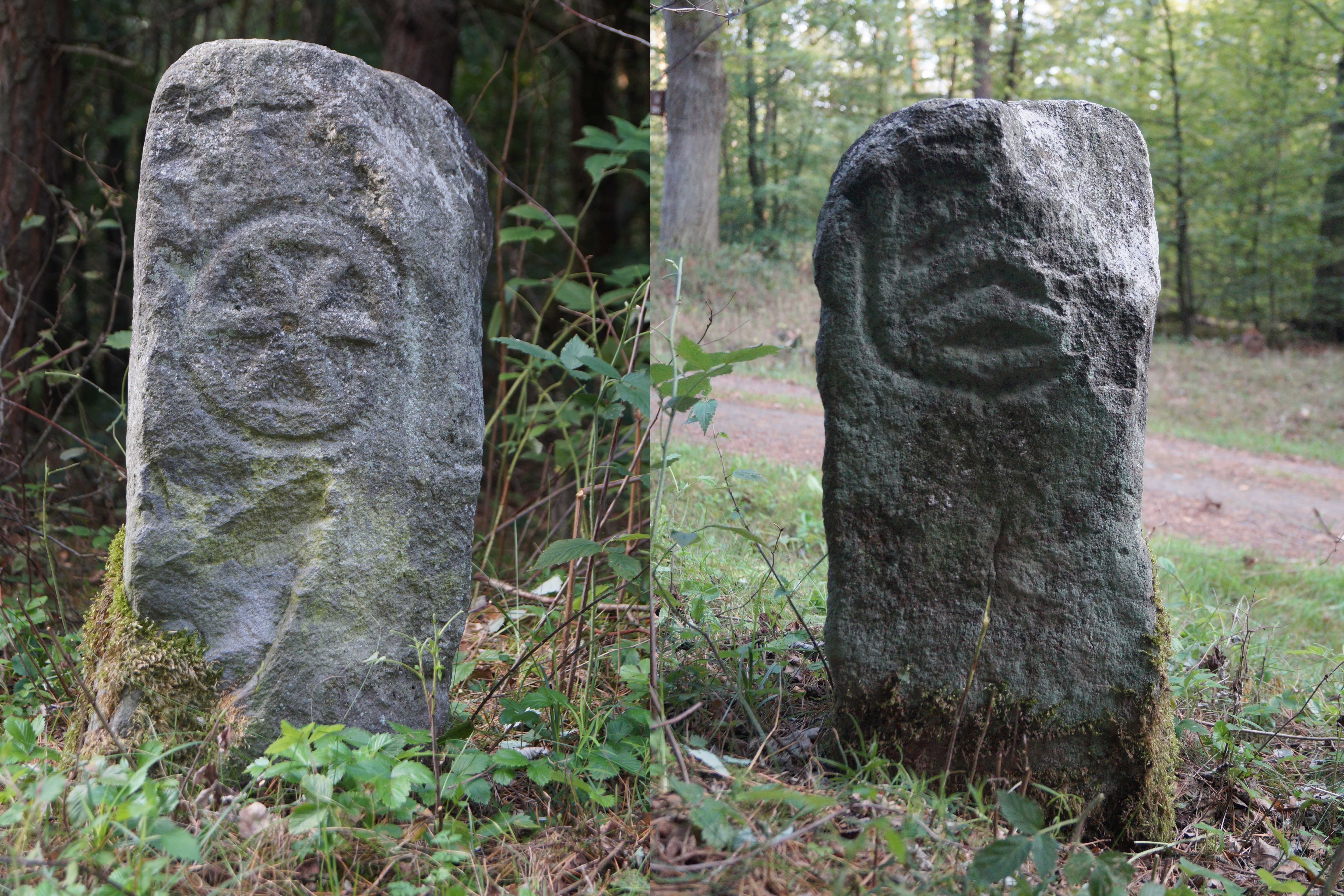 Grenzstein an der Birkenhainer Straße nordöstlich Hanau-Neuwirtshaus. Links Südseite (Mainzer Rad), rechts Nordseite (Hanauer Sparren), leicht beschädigt.